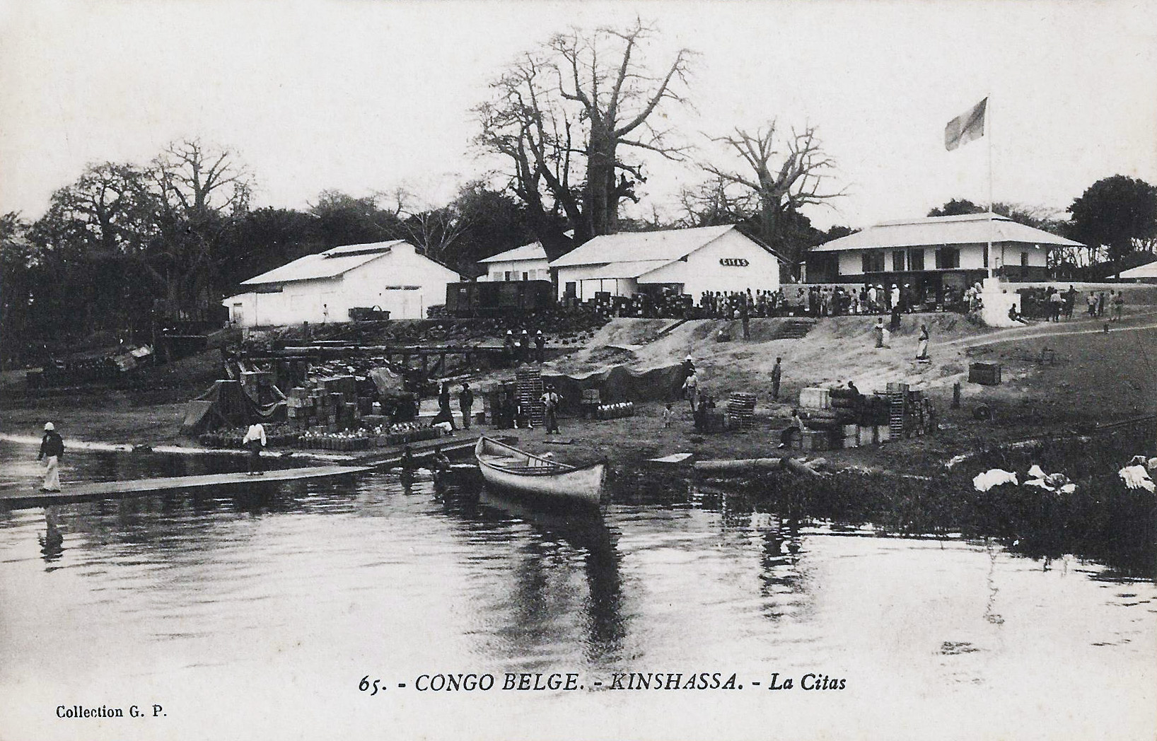 Kinshassa. La Citas. Congo belge. Collection G.P.